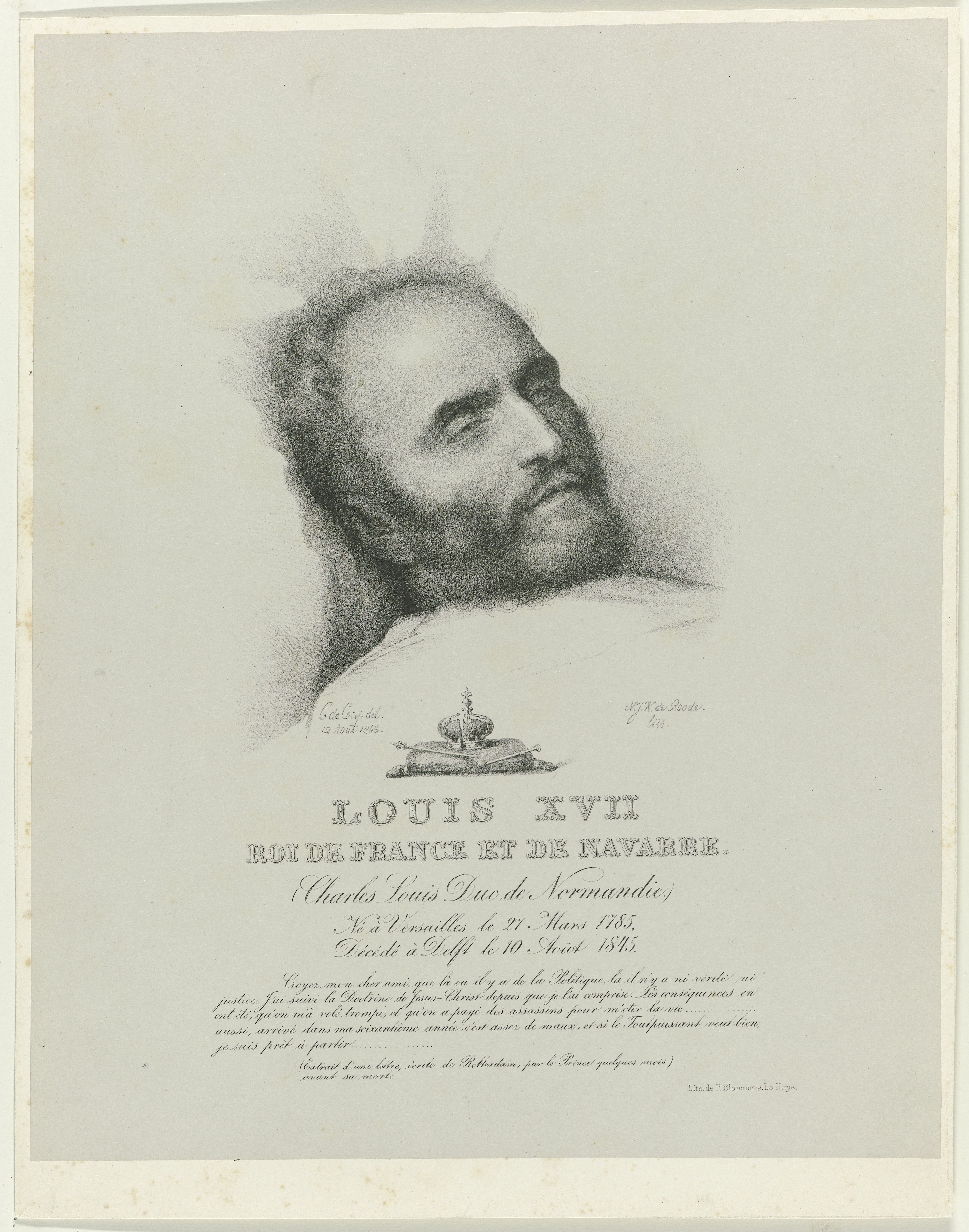 IdentificatieTitel(s): Naundorff, Karl WilhelmLodewijk XVII op zijn doodsbedObjecttype: prent Objectnummer: RP-P-1939-565Omschrijving: Doodsportret van Karl Wilhelm Naundorff; o.t.w.: Louis XVII, roi de France et de NavarreVervaardigingVervaardiger: prentmaker: Nicolaas Johannes Wilhelmus de Roodenaar tekening van: Cornelis de Cocqdrukker: P. Blommers (Steendrukkerij van)Datering: ca. 1845 - ca. 1850Fysieke kenmerken: lithografieMateriaal: papier Techniek: lithografie (techniek)Afmetingen: h 269 mm × b 215 mmVerwerving en rechtenCredit line: Legaat van de heer F.G. Waller, AmsterdamVerwerving: legaat 1939Copyright: Publiek domein